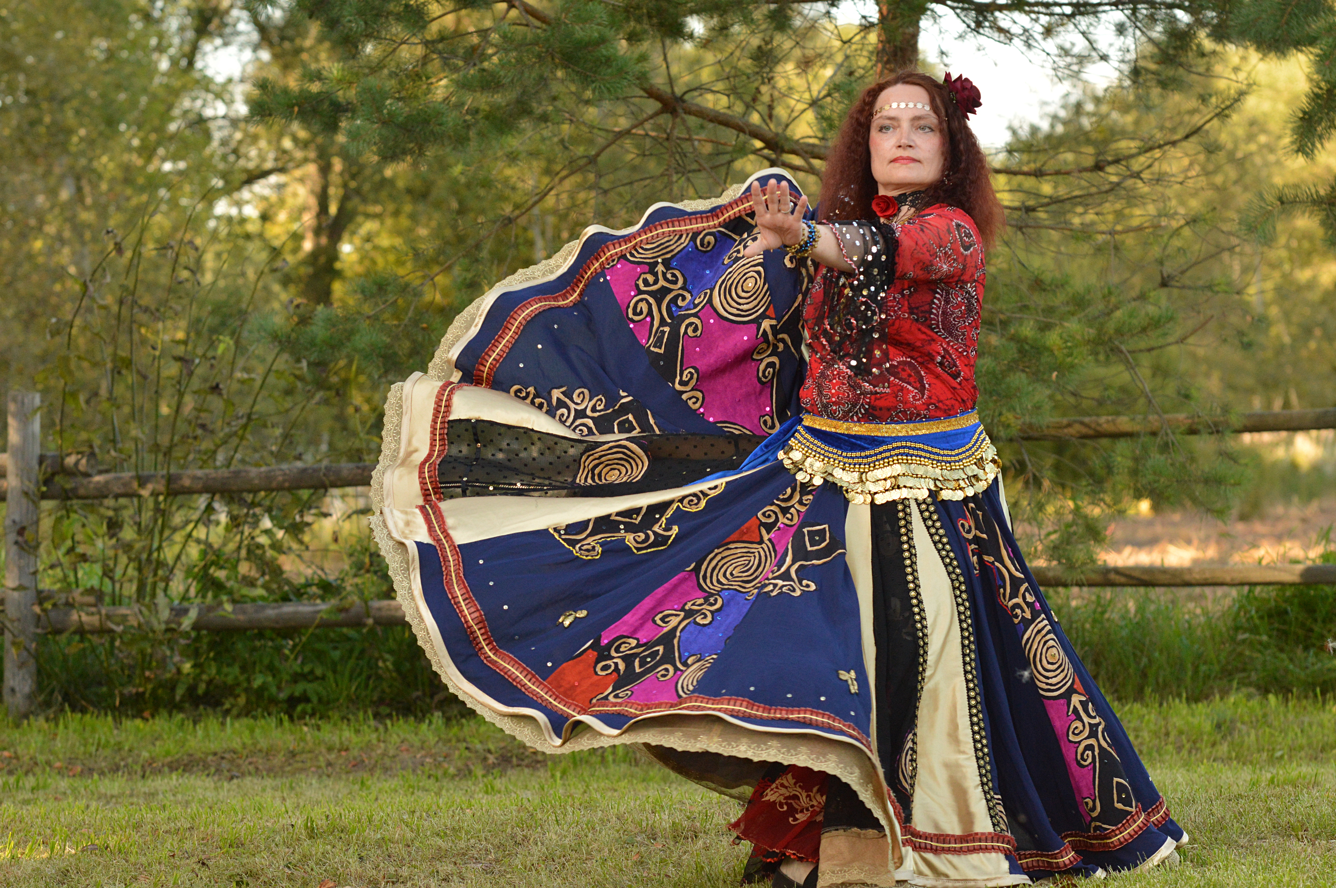 Seto kultuuri festival Radajal. Tartus tegutsev vene mustlastantsu- ja lauluansambel Maljarka. Tantsib Eva Lepik.